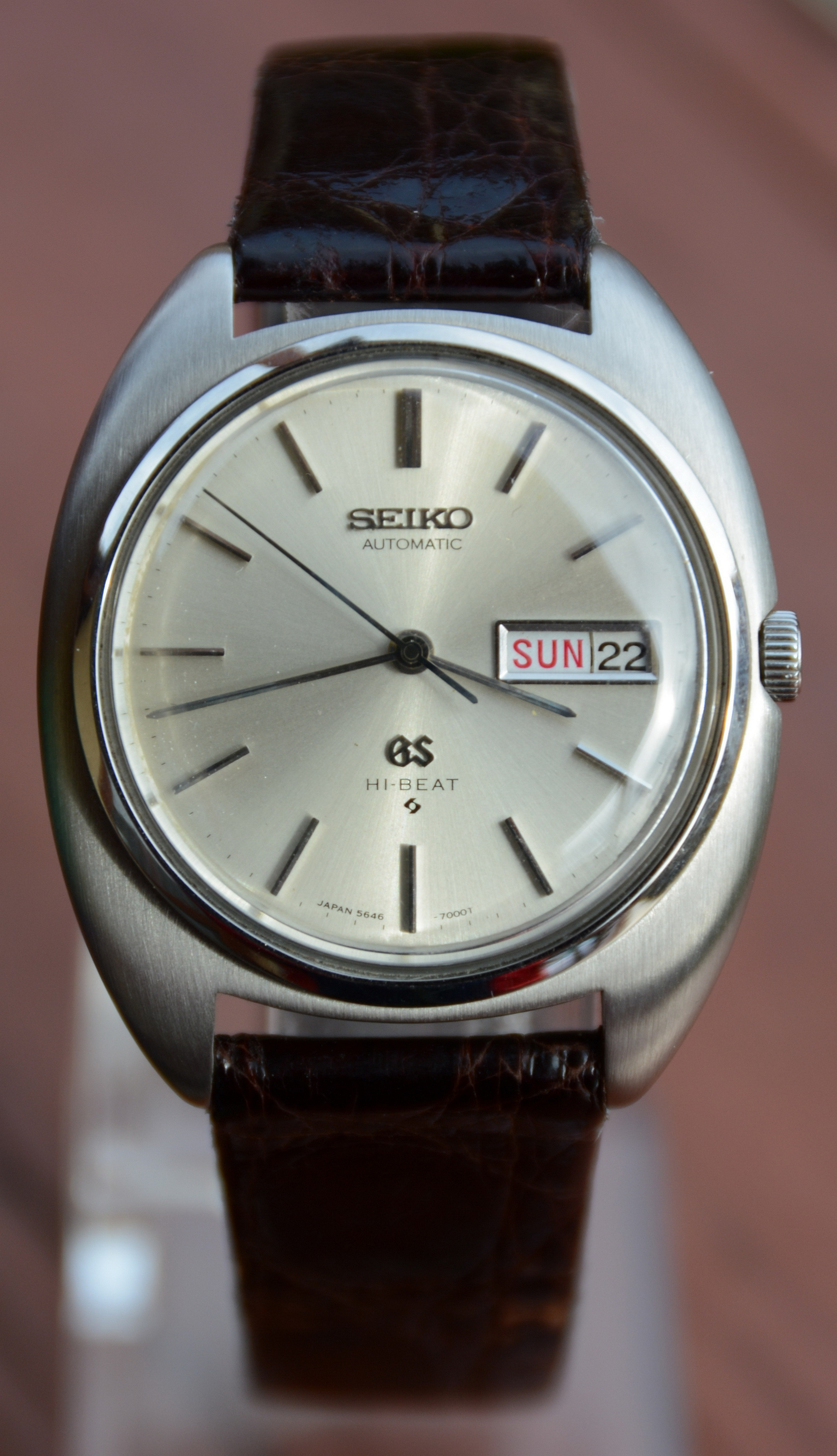 Grand Seiko Automatic Hi-Beat